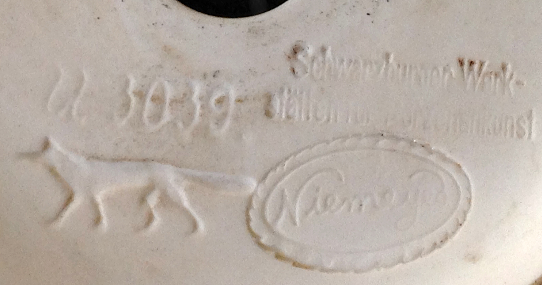 Adelbert Niemeyer Signatur auf der Unterseite einer Tischlampe der Unterweißbacher_Werkstätten_für_Porzellankunst